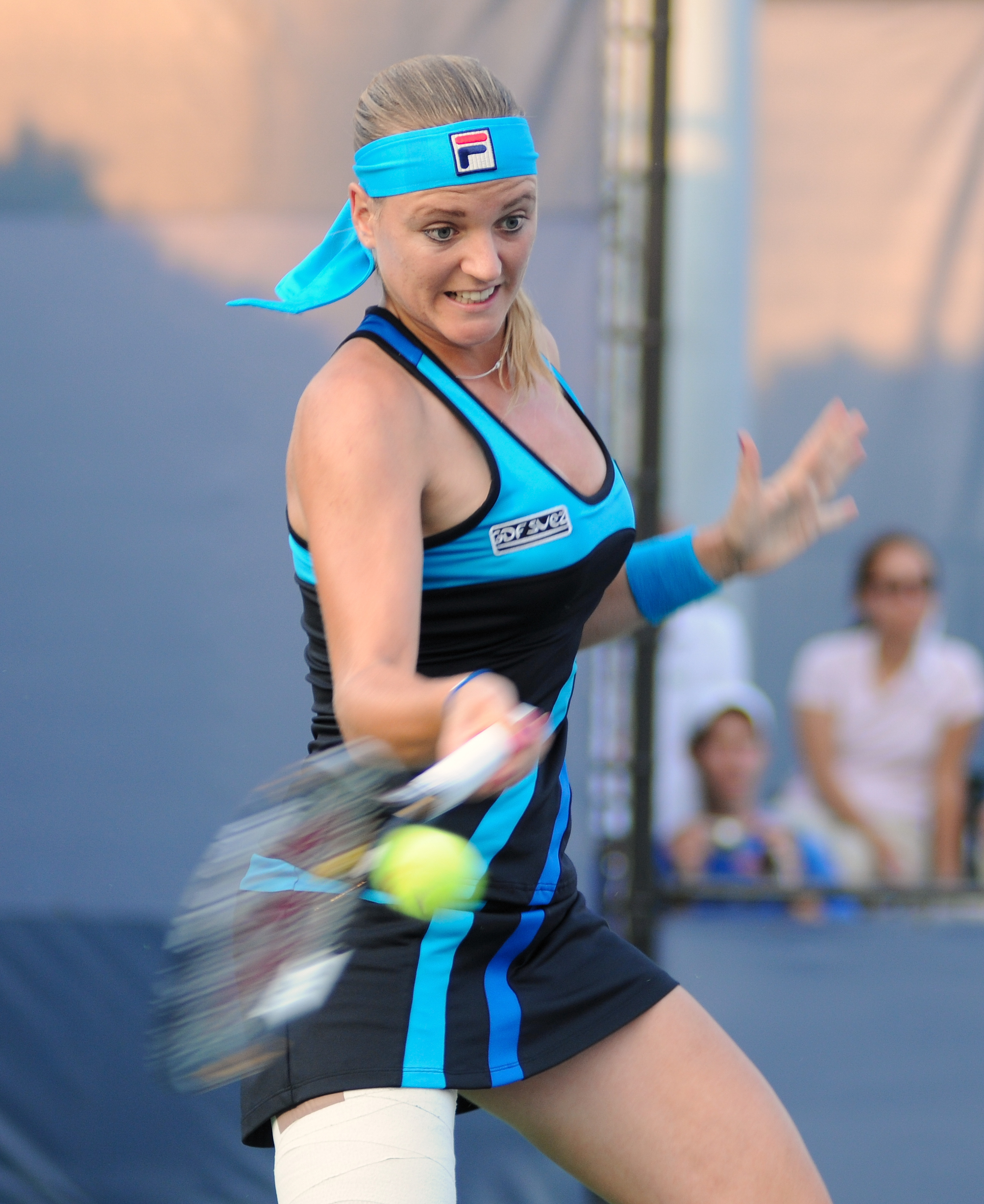 Agnes Szavay - US Open 2010